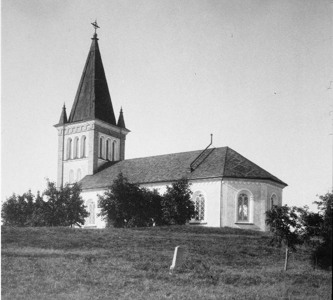 Kyrkan från sydöst. Kategori: (01) ExteriörerKyrkan från sydöst.